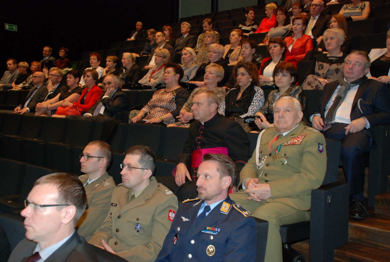 Szczecin, 2014r. 70-lecie 109 Szpitala Wojskowego